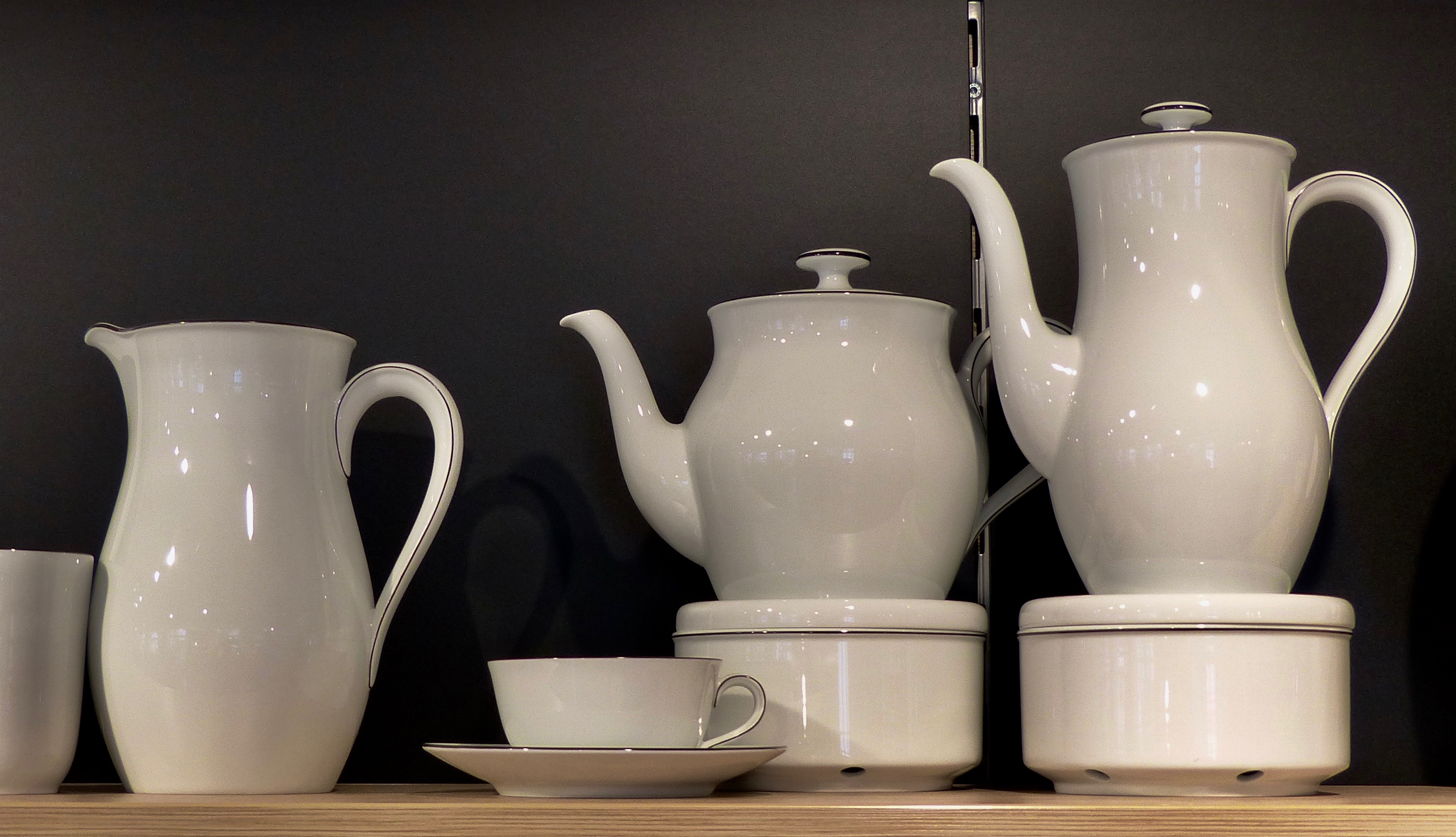 Geschirrteil des Service Wagenfeld 639 GLAM-on-Tour: Porzellanmanufaktur Fürstenberg Wikipedianer fotografierten vom 6.– 8. Oktober 2017 die Ausstellungstücke im Museum Schloss Fürstenberg, Glasmuseum Boffzen und im Kragstuhlmuseum. This photo was taken during a project supported by WMDE Gefördert von / Supported by: Wikimedia Deutschland, Museum Schloss Fürstenberg, Glasmuseum Boffzen und Kragstuhlmuseum Für das Museum Schloss Fürstenberg: This work is free and may be used by anyone for any purpose. If you wish to use this content, you do not need to request permission as long as you follow any licensing requirements mentioned on this page.